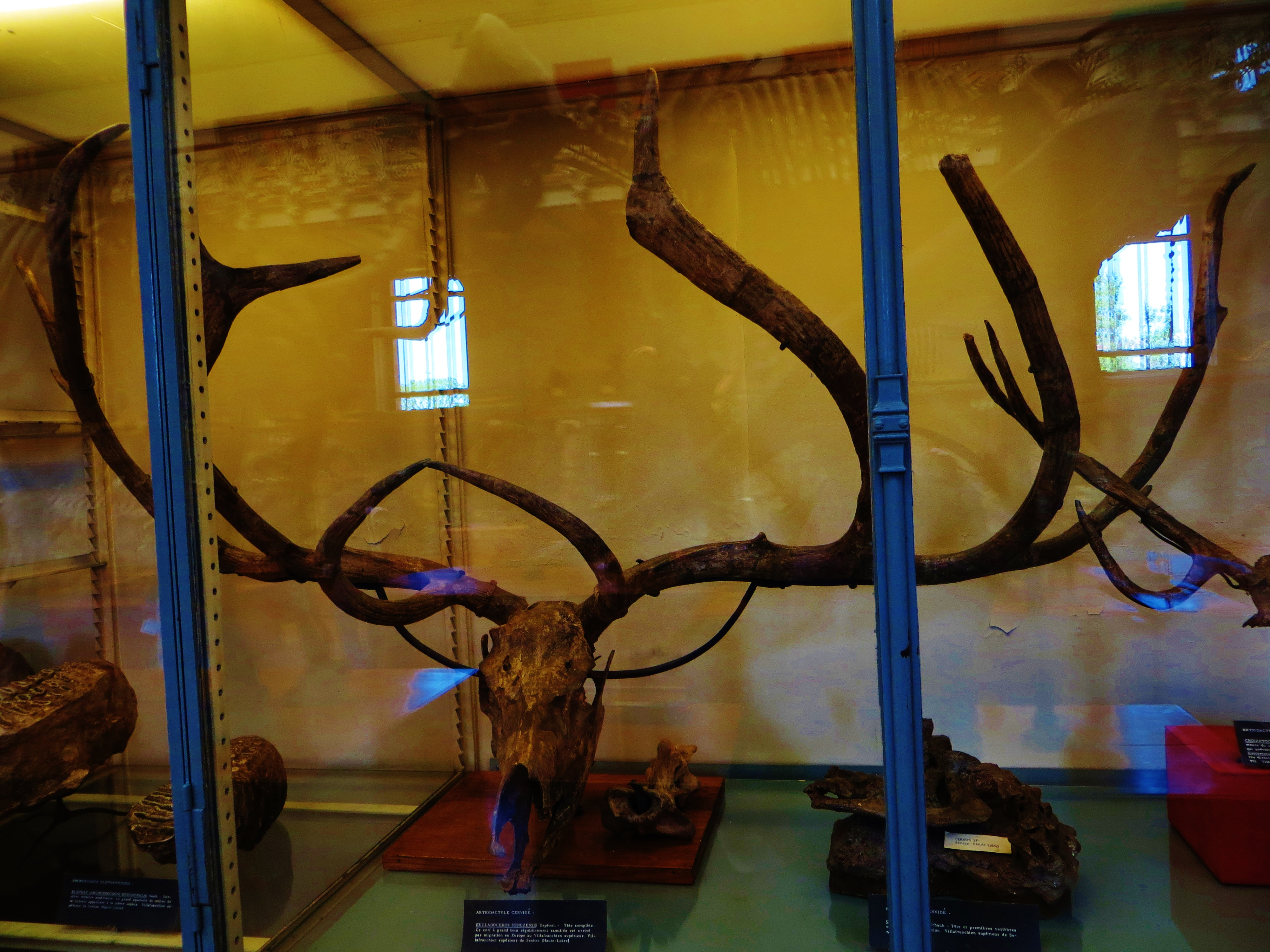 Fossil of Eucladoceros, an extinct mammal- Took the photo at Musee d'Histoire Naturelle, Paris